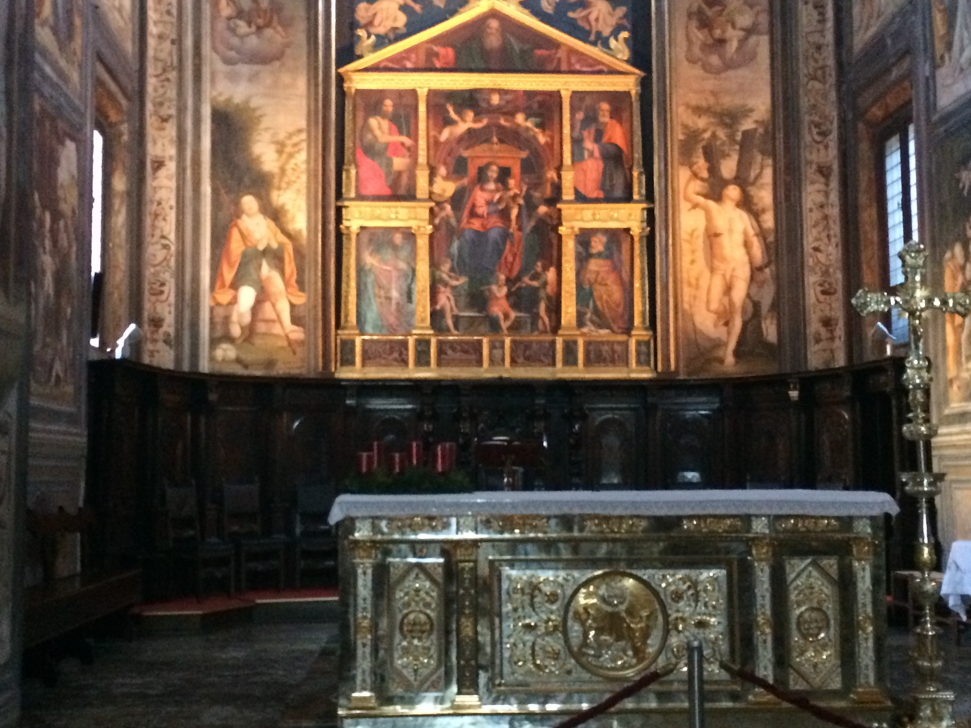 I cori della basilica di San Magno